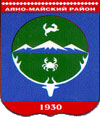 Герб Аяно-Майского района Хабаровского края